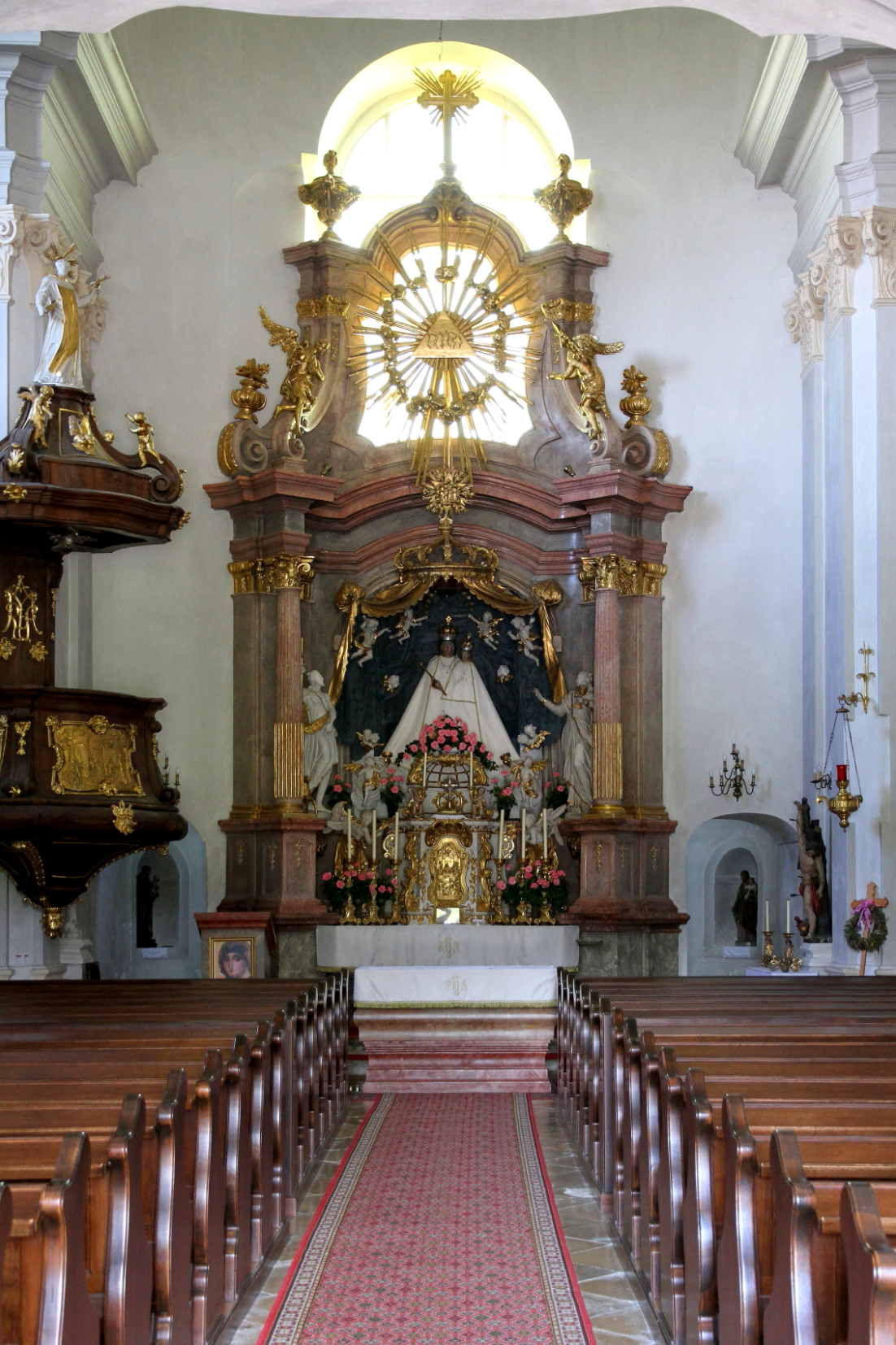 Hochaltar der Pfarrkirche hl. Johannes d. T. in der burgenländischen Gemeinde Stotzing.